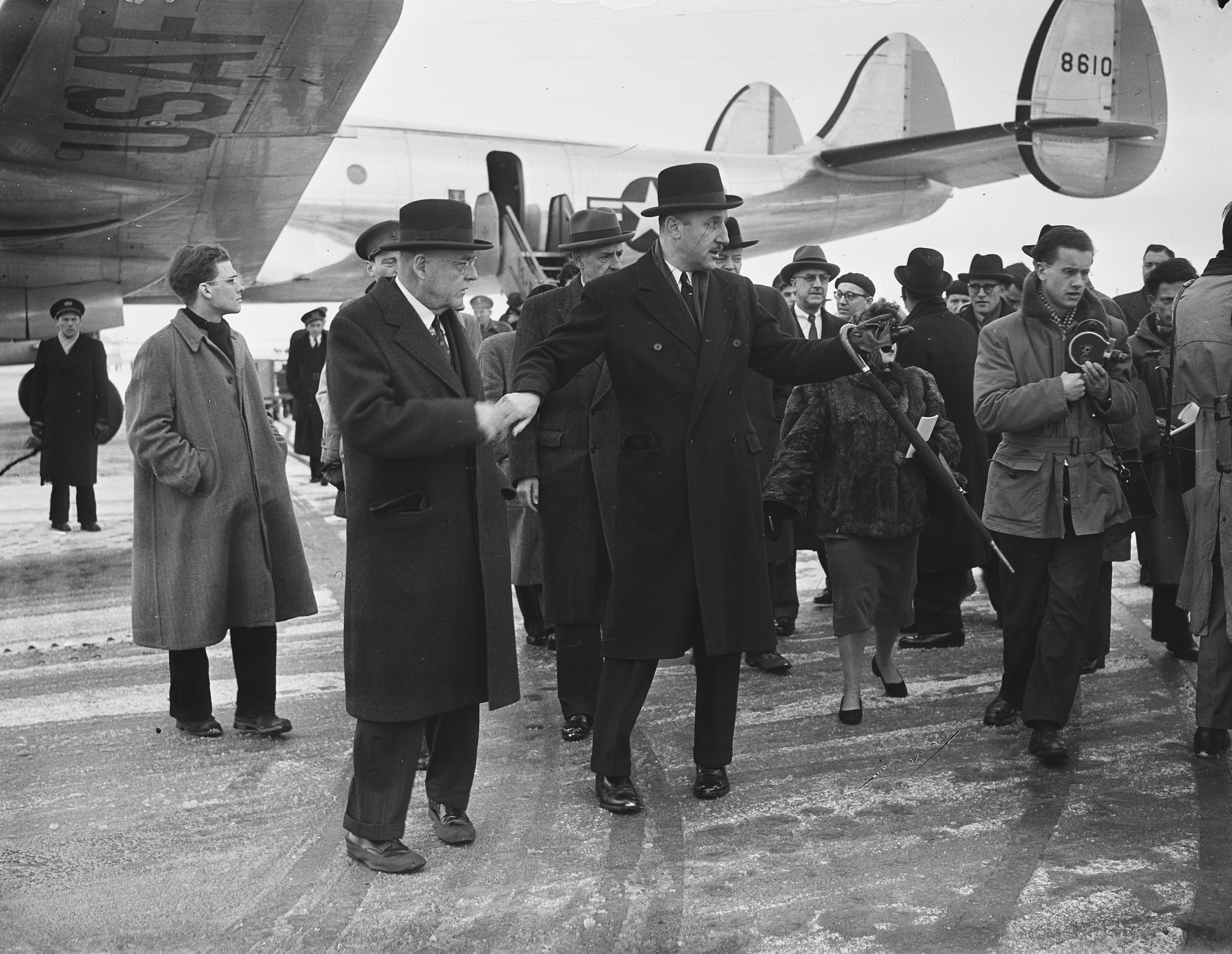 Collectie / Archief : Fotocollectie Anefo Reportage / Serie : [ onbekend ] Beschrijving : Ministers Foster Dulles en Stassen, aankomst Schiphol Datum : 6 februari 1953 Locatie : Noord-Holland, Schiphol Trefwoorden : aankomsten, ministers, vliegvelden Persoonsnaam : Dulles, John Foster Fotograaf : Bilsen, Joop van / Anefo, [onbekend] Auteursrechthebbende : Nationaal Archief Materiaalsoort : Glasnegatief Nummer archiefinventaris : bekijk toegang 2.24.01.09 Bestanddeelnummer : 905-5287